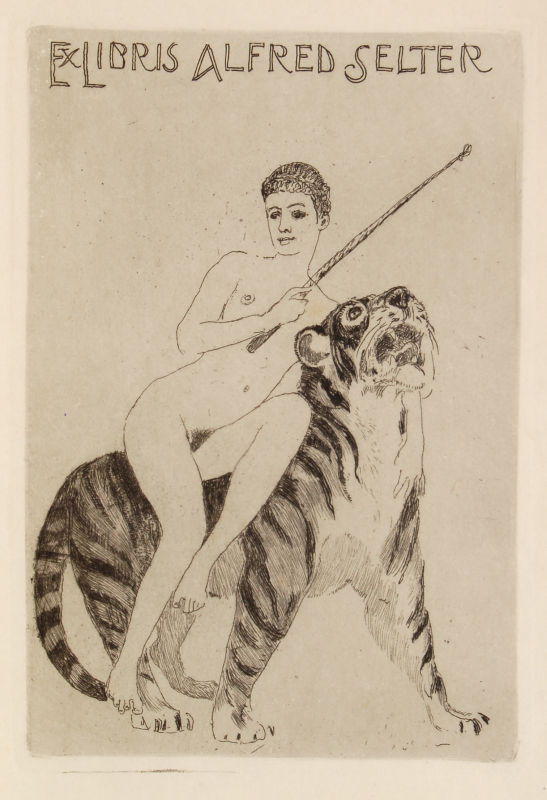 Ex Libris Alfred Selter. Radierung. 12,5 x 8,5 cm (Plattengröße)